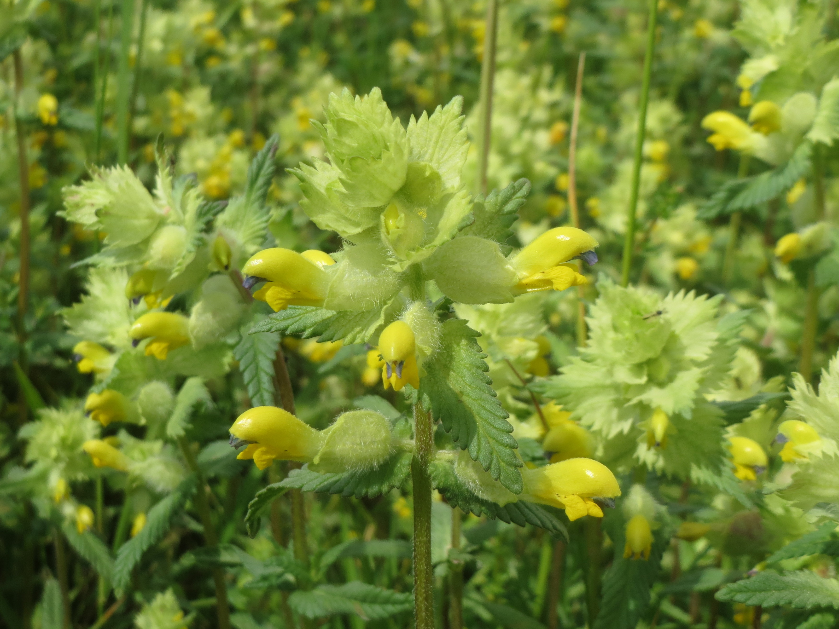 Größerer Bestand vom Zottigen Klappertopf (Rhinanthus alectorolophus) im Naturschutzgebiet „Karl-Ludwig-See“ im Landschaftsschutzgebiet „Hockenheimer Rheinbogen“